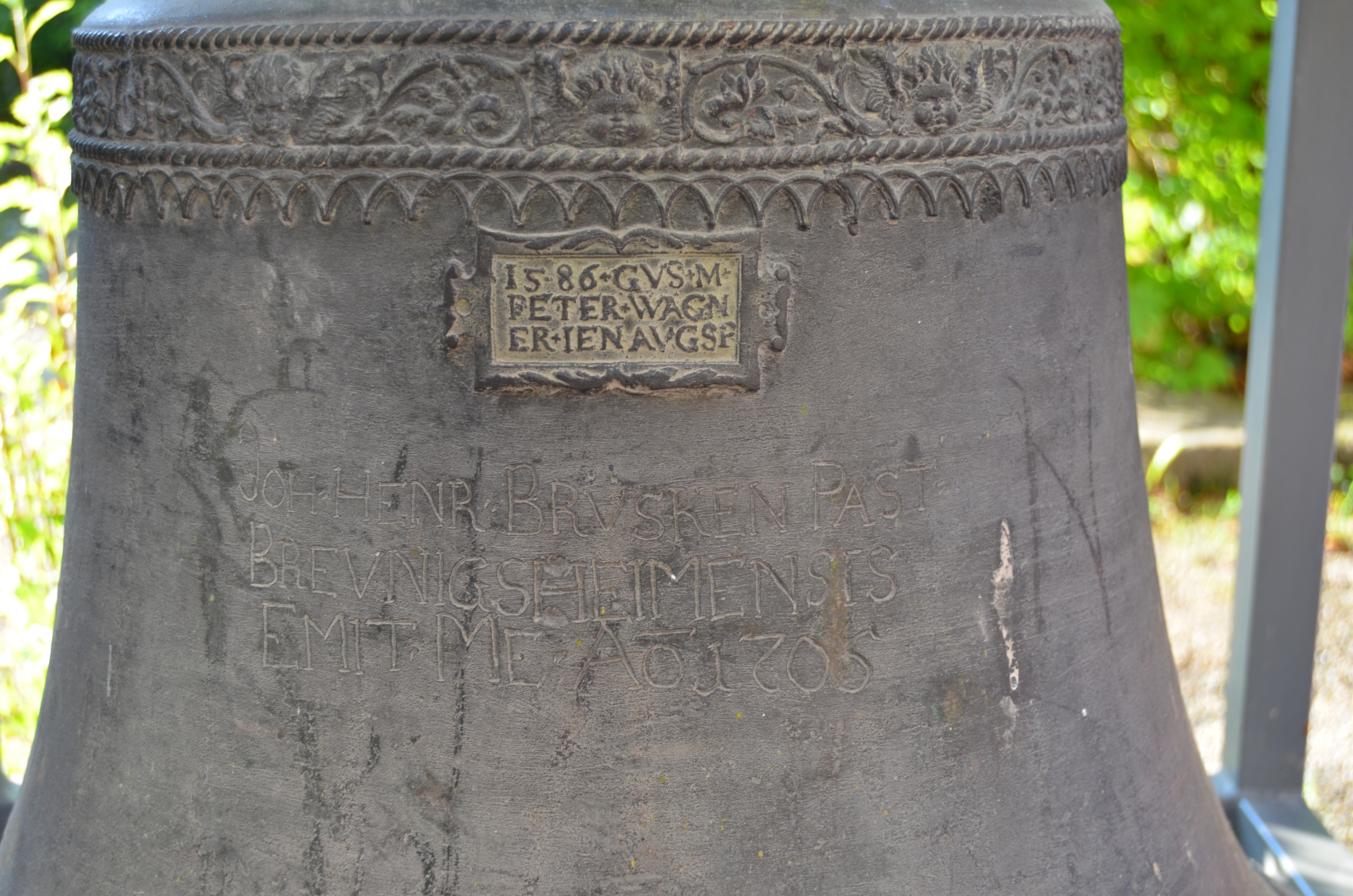 Preungesheim, Ev. Kreuzkirche, Glocke